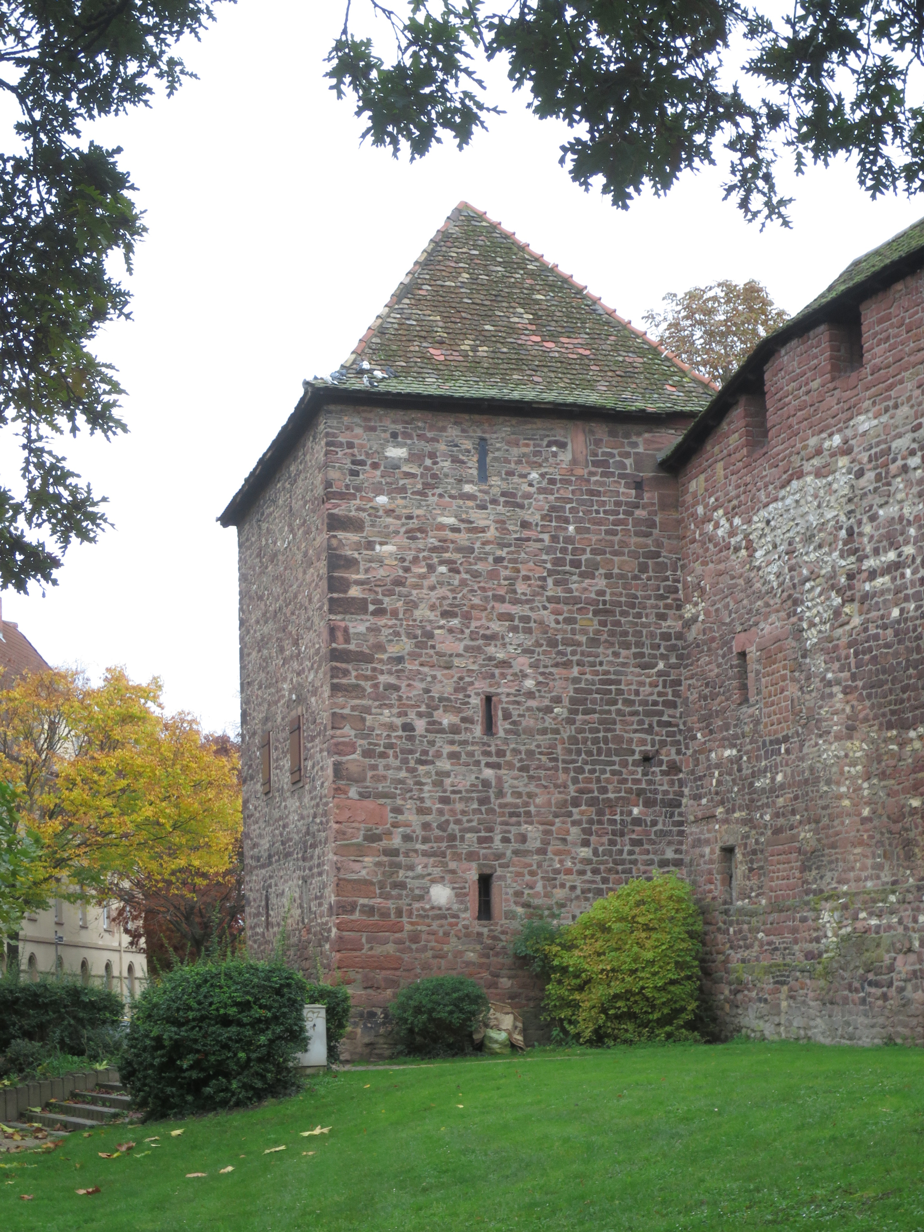 Stadtmauer Worms, Scharfrichterturm